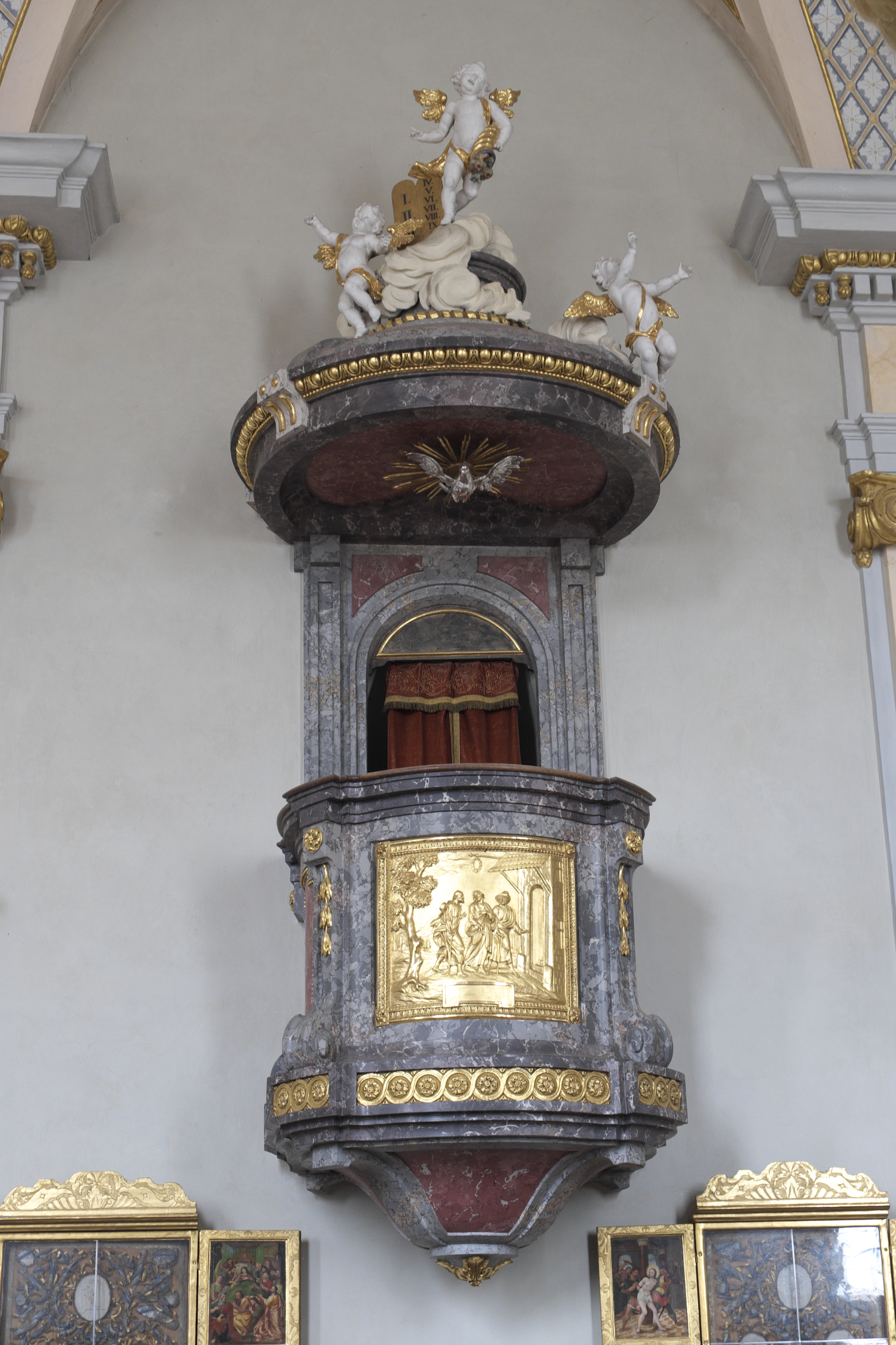 Katholische Pfarrkirche St. Jakob in Mammendorf im Landkreis Fürstenfeldbruck (Bayern/Deutschland), klassizistische Kanzel aus Stuckmarmor von Johann Michael Sporer, um 1800